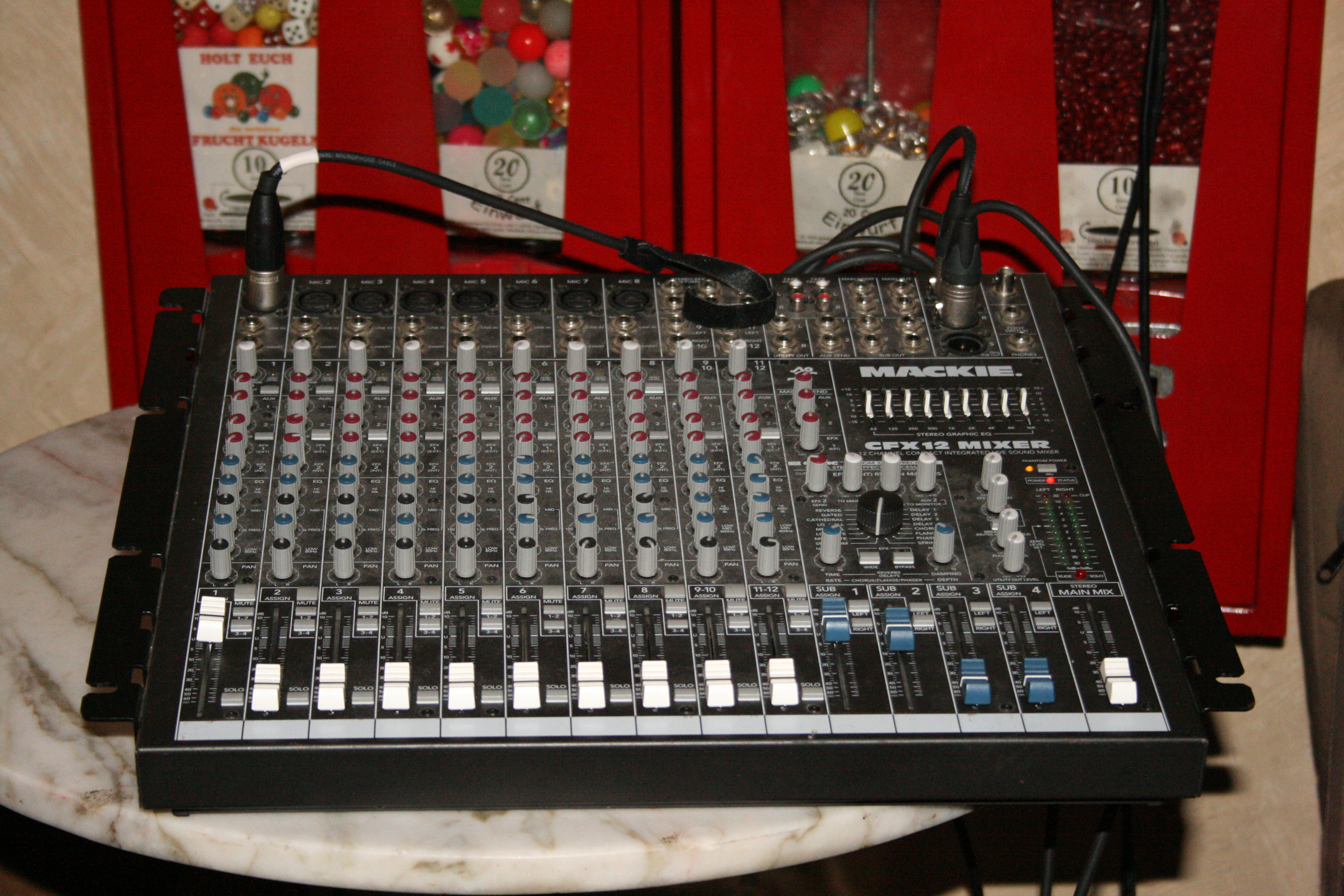 Mackie CFX12 12 ch Live Sound Mixer Hier laufen alle Fäden zusammen 24 April 2008